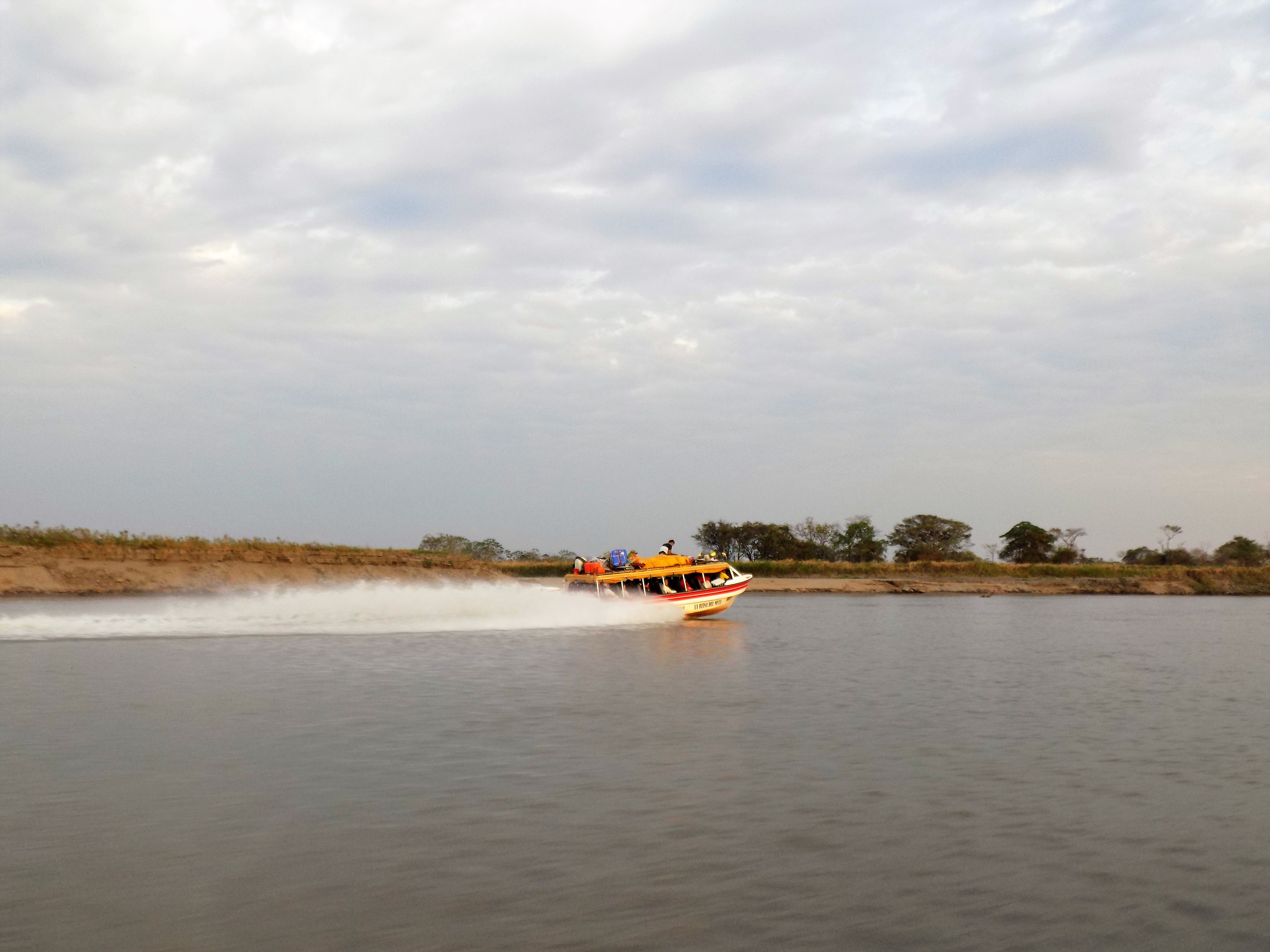 El transporte fluvial resulta el sistema más eficiente en este territorio dadas las precarias condiciones de la infraestructura vial en la profundidad de la orinoquía. Diáriamente salen uno o dos yates (lanchas grandes) que transitan entre los municipios de Puerto Gaitán (Meta) y Puerto carreño (Vichada) en ambos sentidos; estos yates transportan pasajeros, animales pequeños y mercancías.